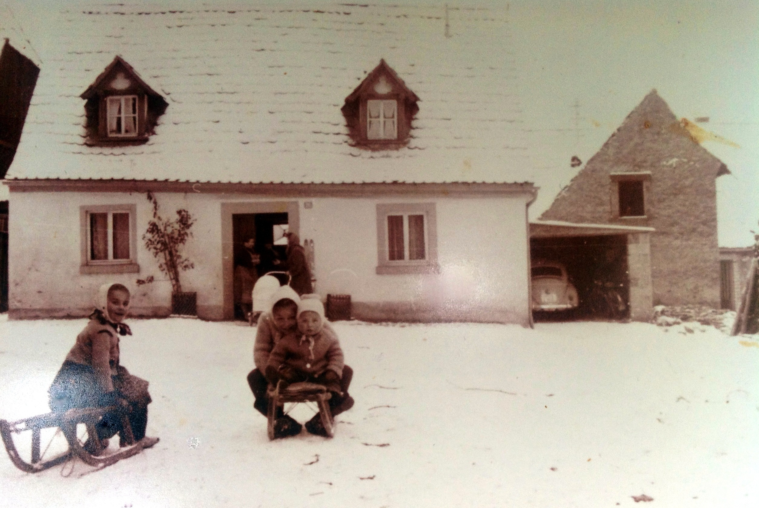 in Heuchelheim